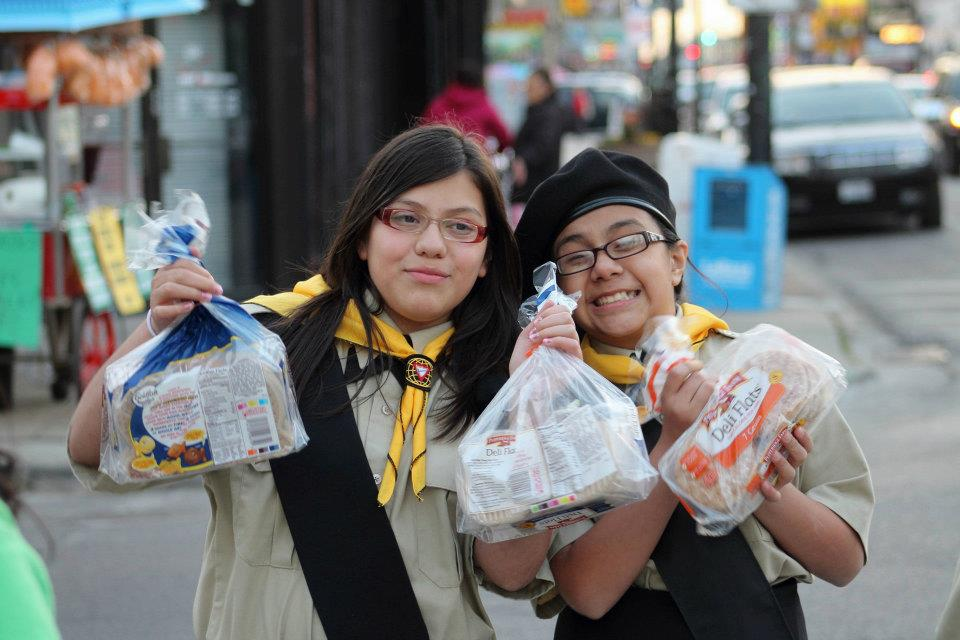 Club Emmanuel